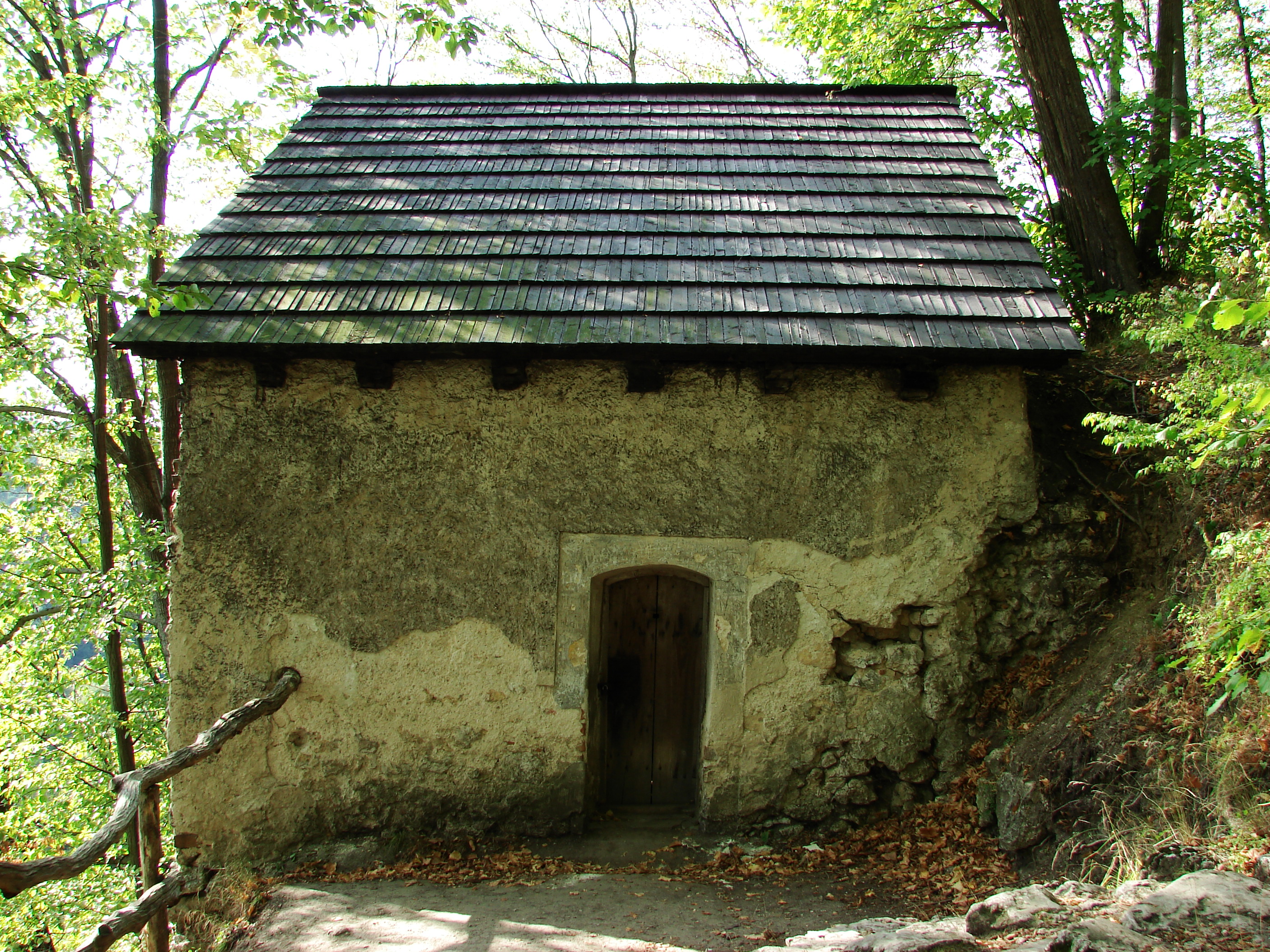 Pustelnia Błogosławionej Salomei w Grodzisku na zachód od Skały